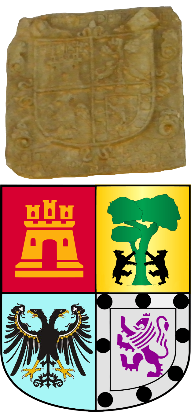 Escudos de la Plaza Mayor